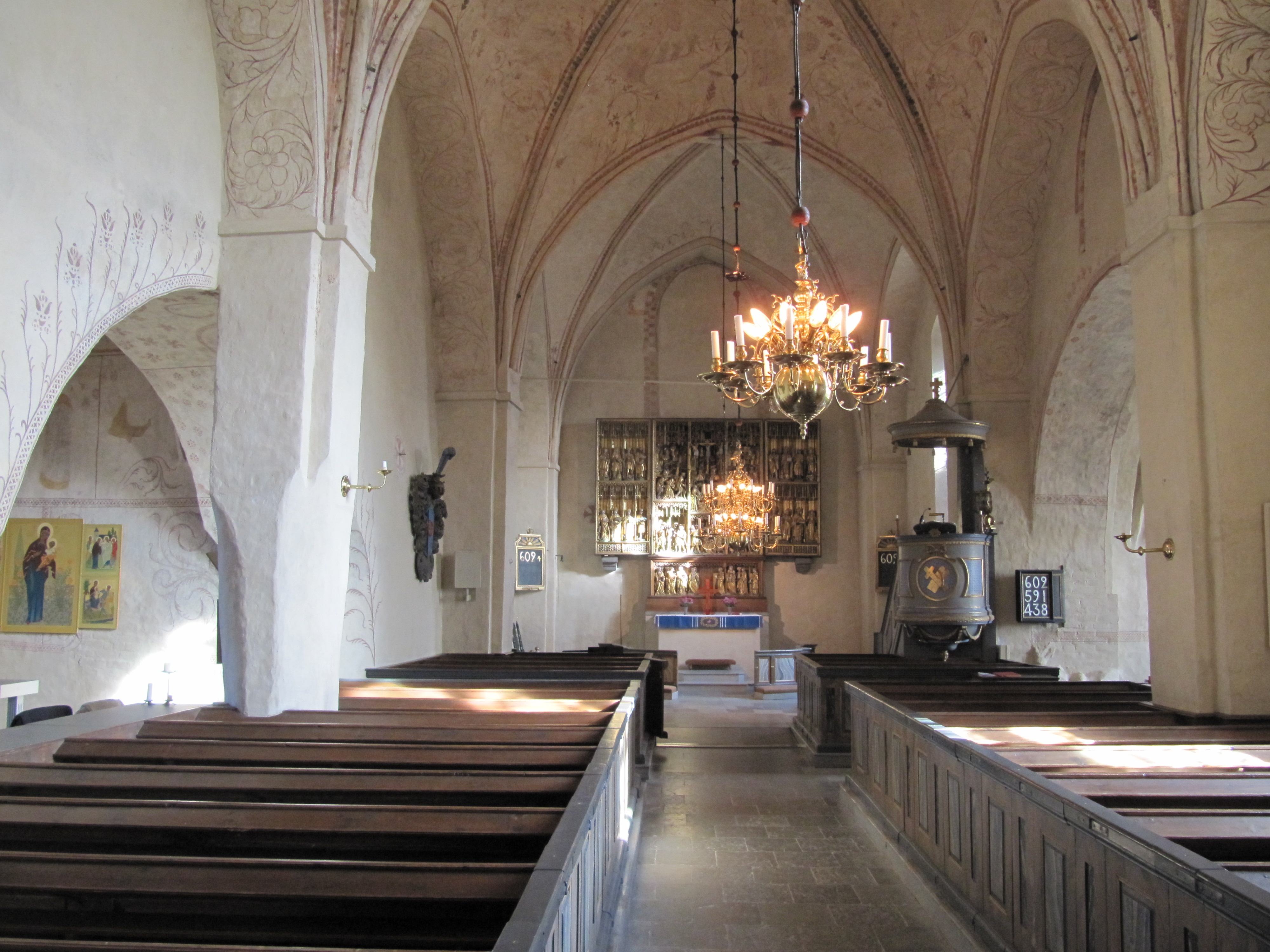 Kyrkorum i Vaksala kyrka